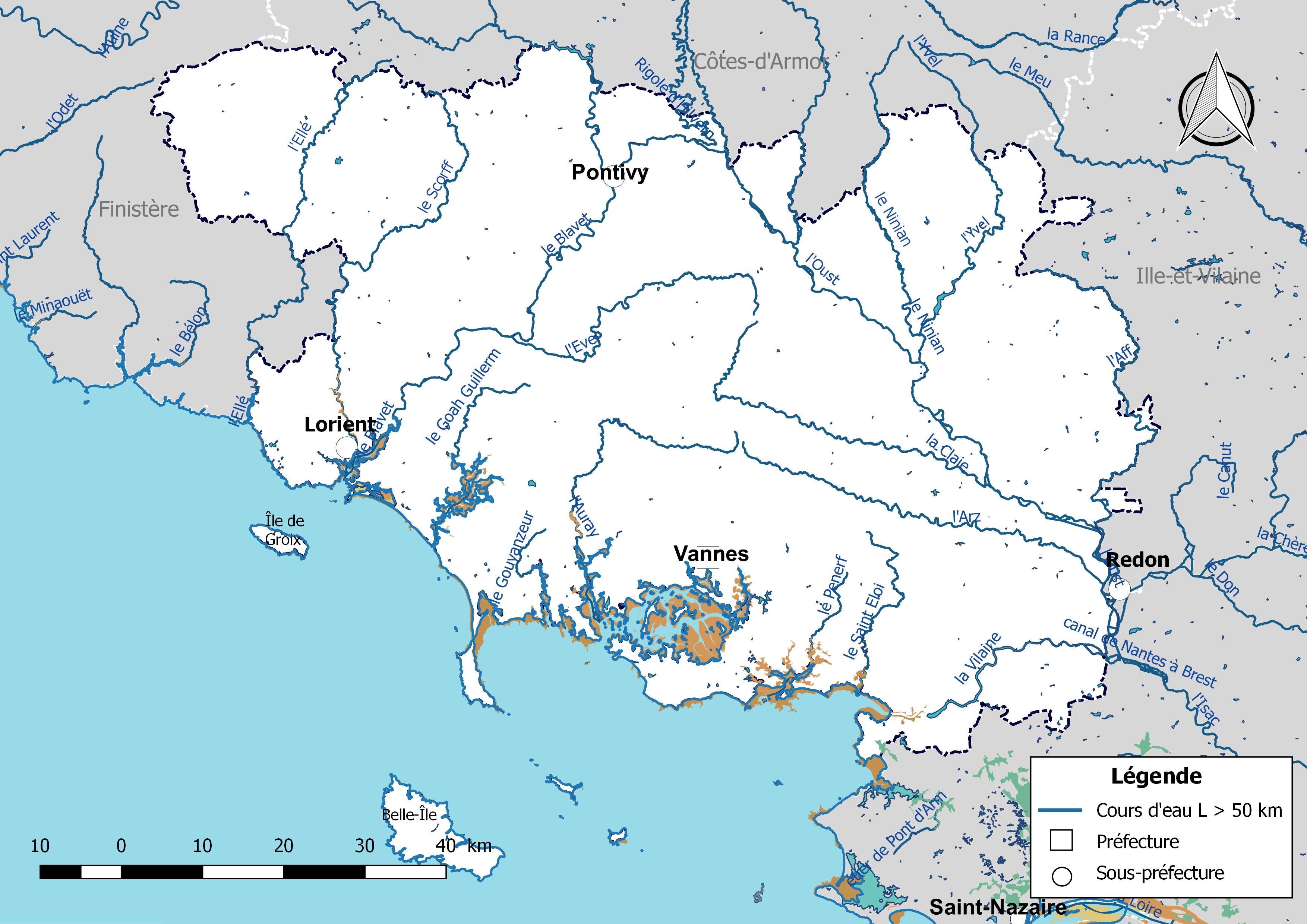 Carte des cours d'eau de longueur supérieure à 50 km drainant le département du Morbihan (France).